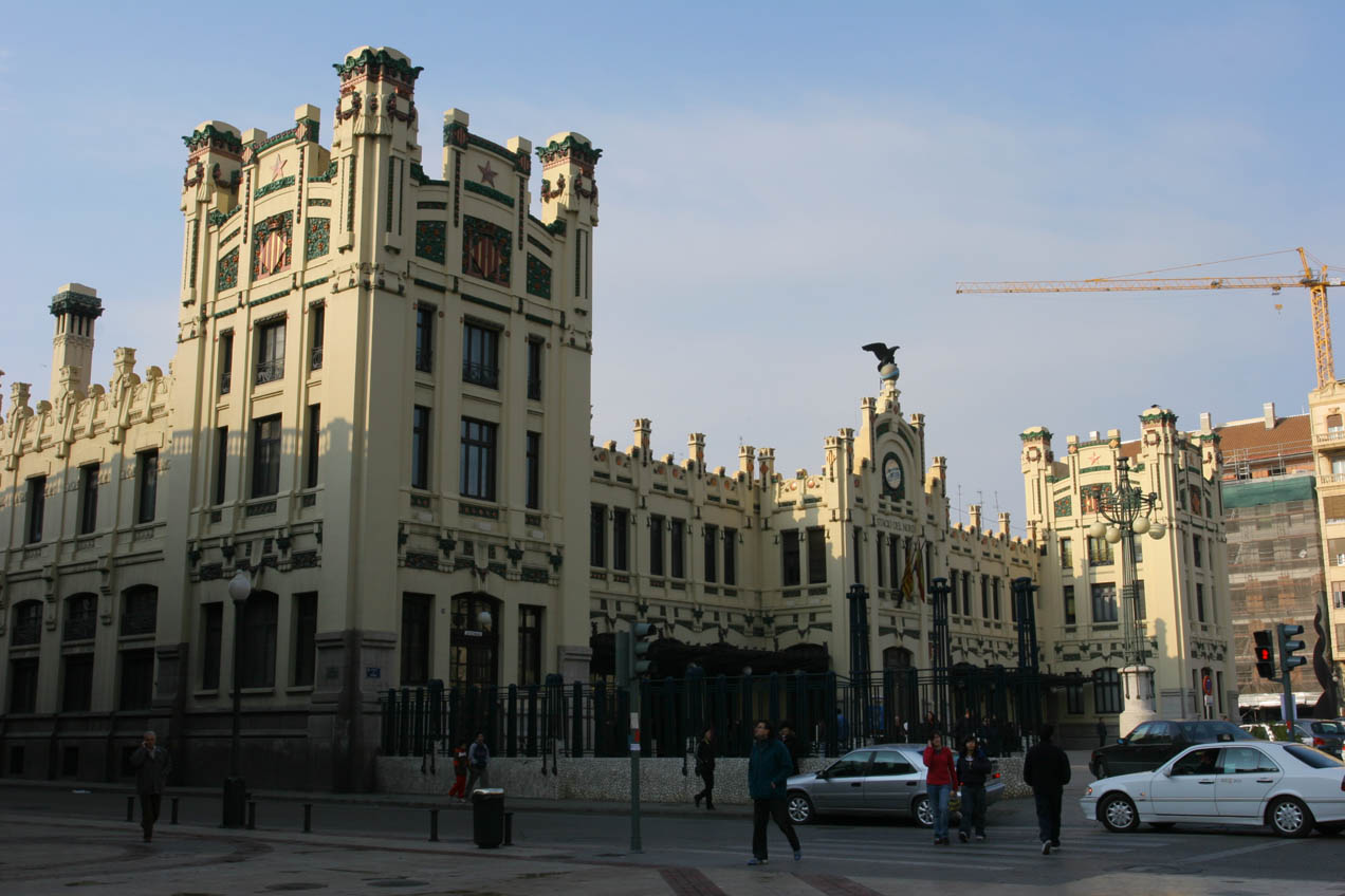 Estació del Nord, Ciutat de València. Vista lateral des de la Plaça de Bous.